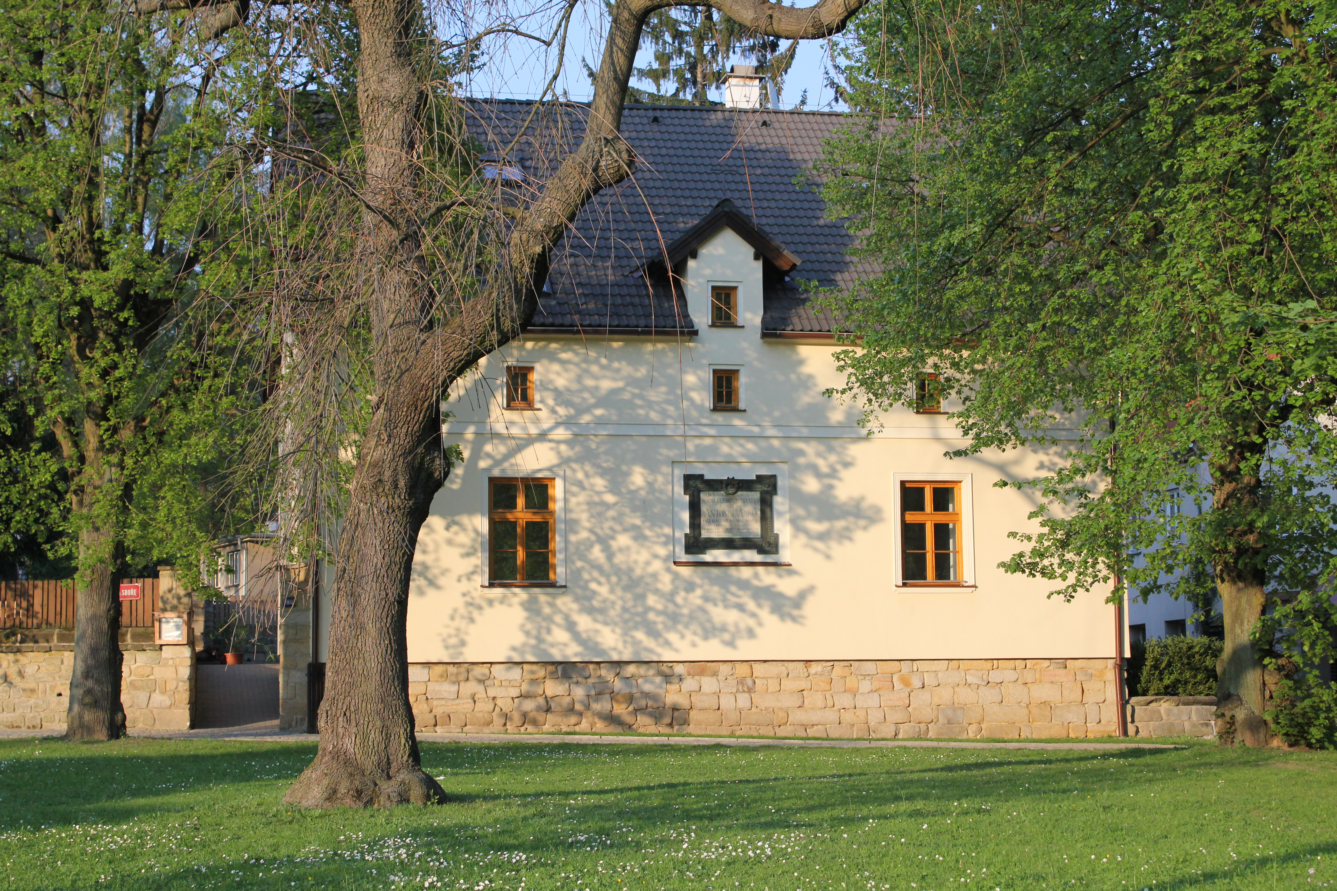 Rodný dům Antonína Marka, sbor při Českobratrské církvi evangelické, "Na Sboře"